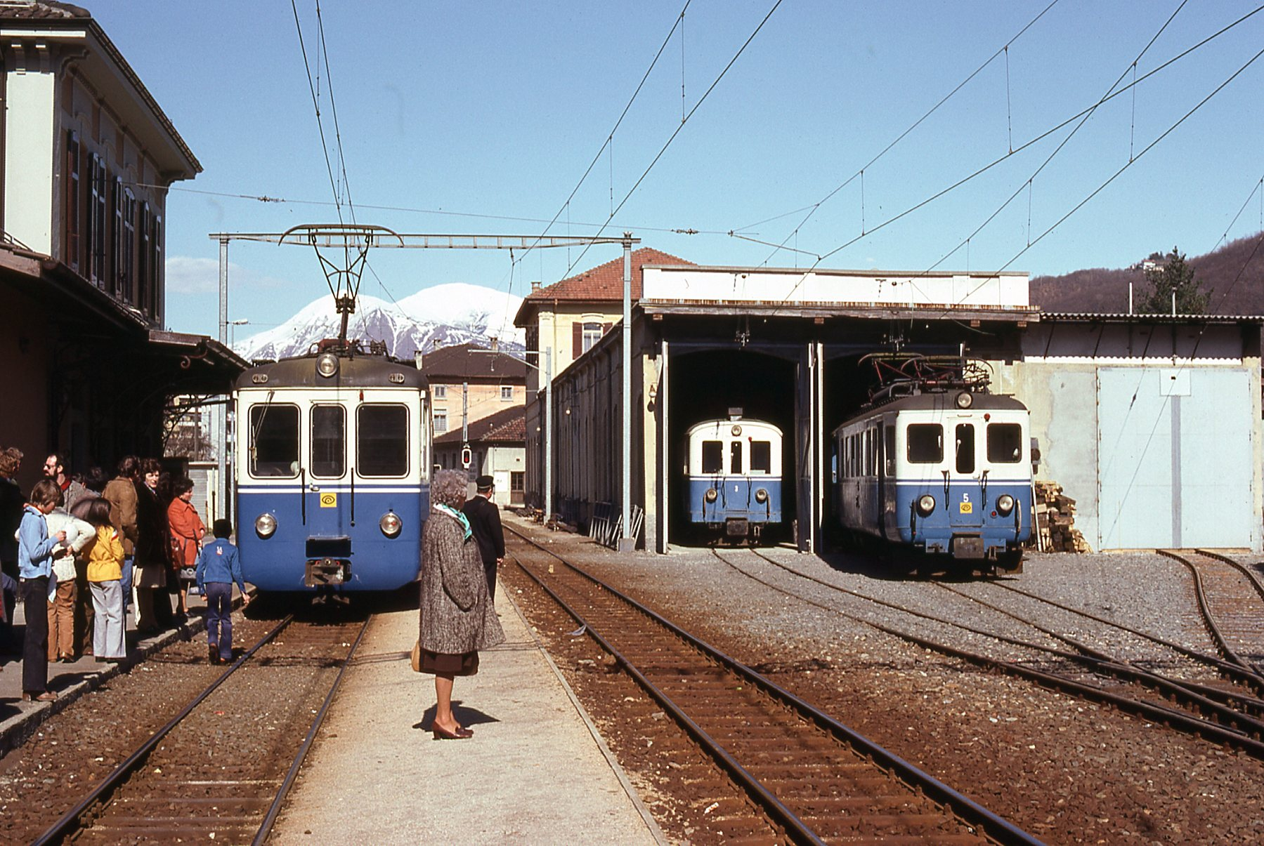 Stazione di Agno, con in sosta tre serie di rotabili in servizio sulla ferrovia Lugano-Ponte Tresa. Da sinistra a destra un elettrotreno ABe 4/6 10 ÷ 12, l'elettromotrice n. 3 (serie ABe 4/4 1 ÷ 3) e l'elettromotrice n. 5 (serie ABe 4/4 4 ÷ 5).